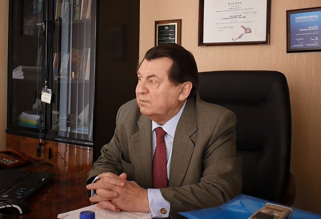 Фото Евгения Александровича Козловского.